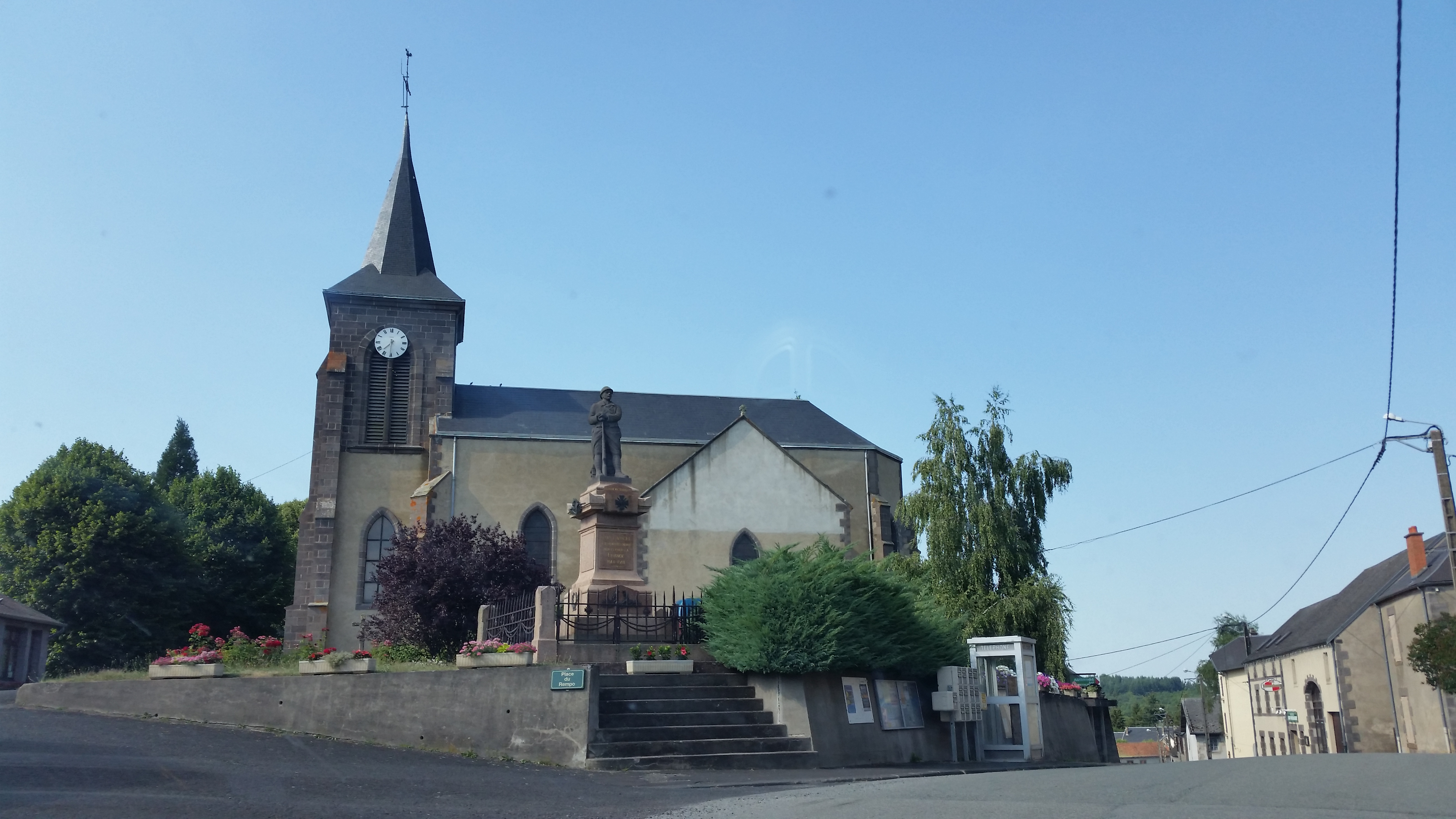 Photographie de l'église du village avec en premier plan un monument aux morts.